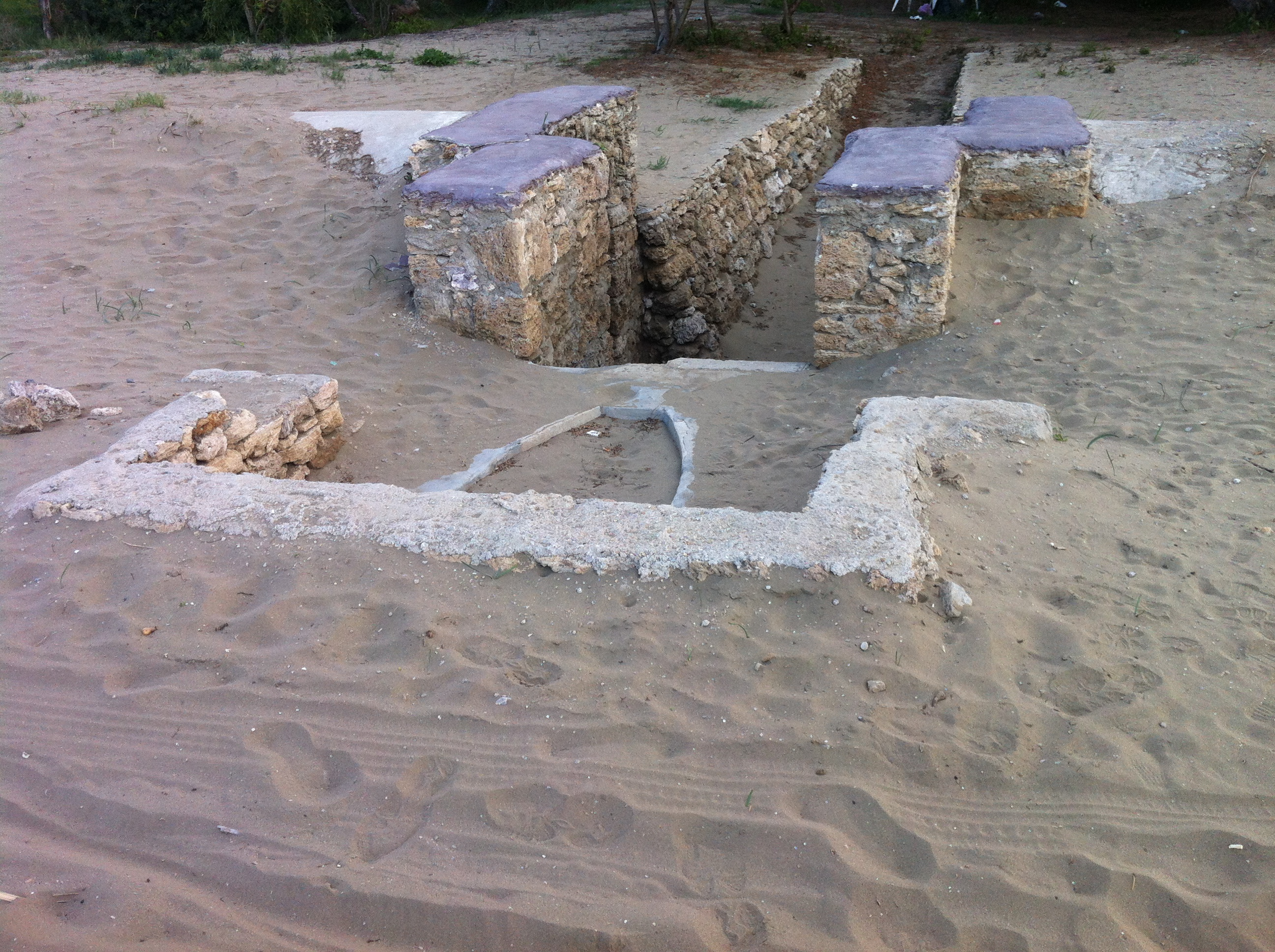 Bunker presente sulla spiaggia di Capaccio-Paestum